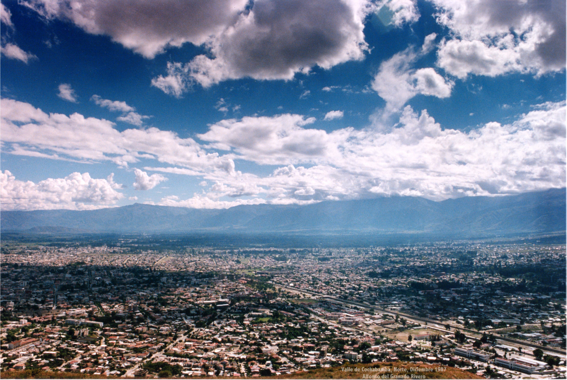 Valle de Cochabamba, Norte